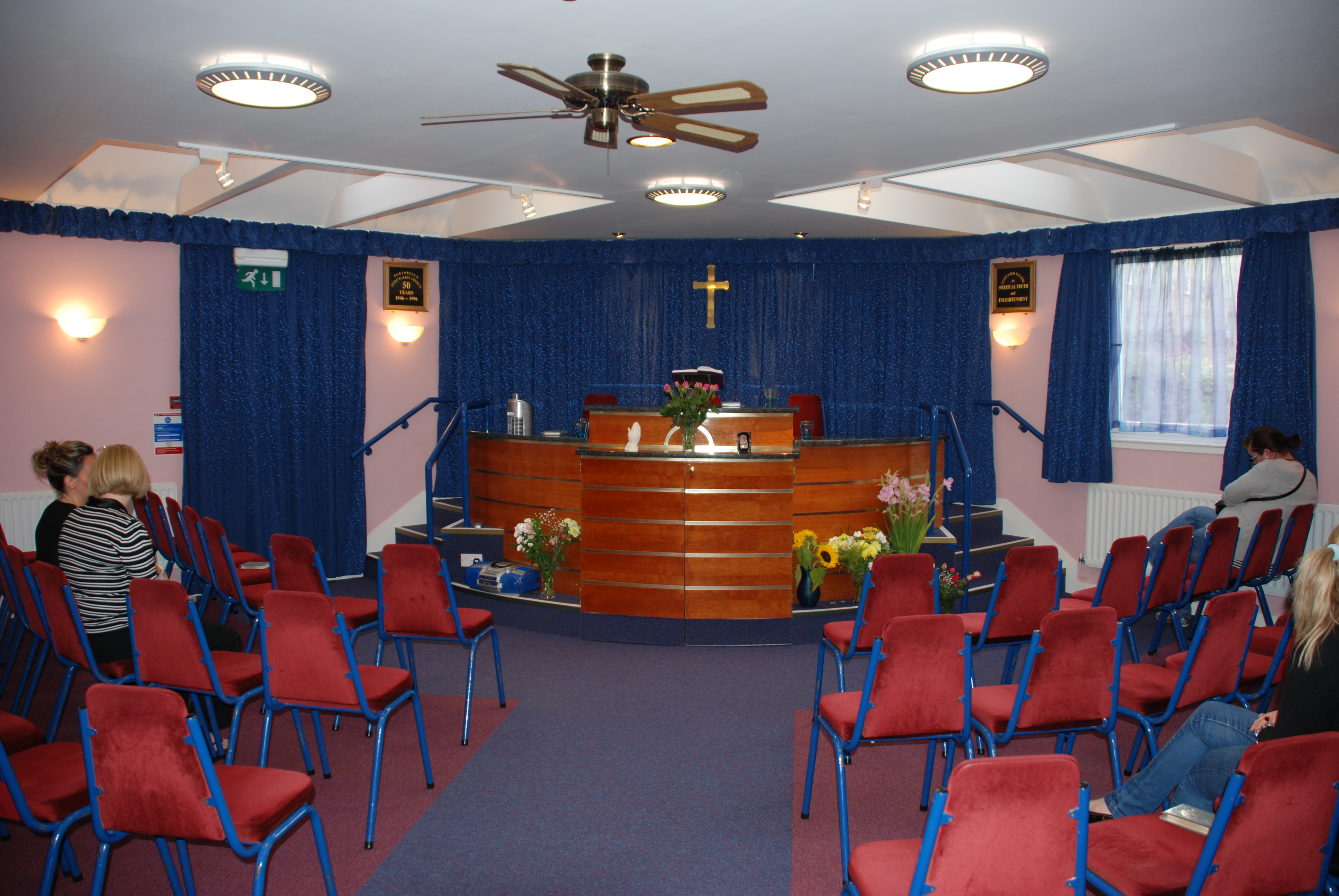 Intérieur d'une Eglise Spiritualiste. Ici à Portobello, banlieue d'Edimbourg.